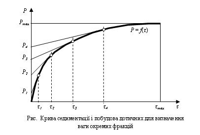 Сед.а.-крива